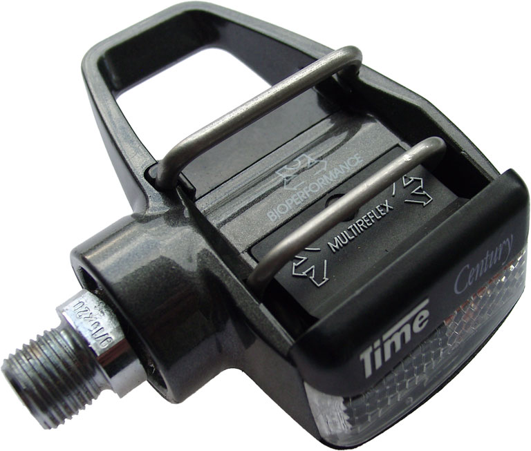 Fahrradpedal, GNU-FDL, selbst fotografiert